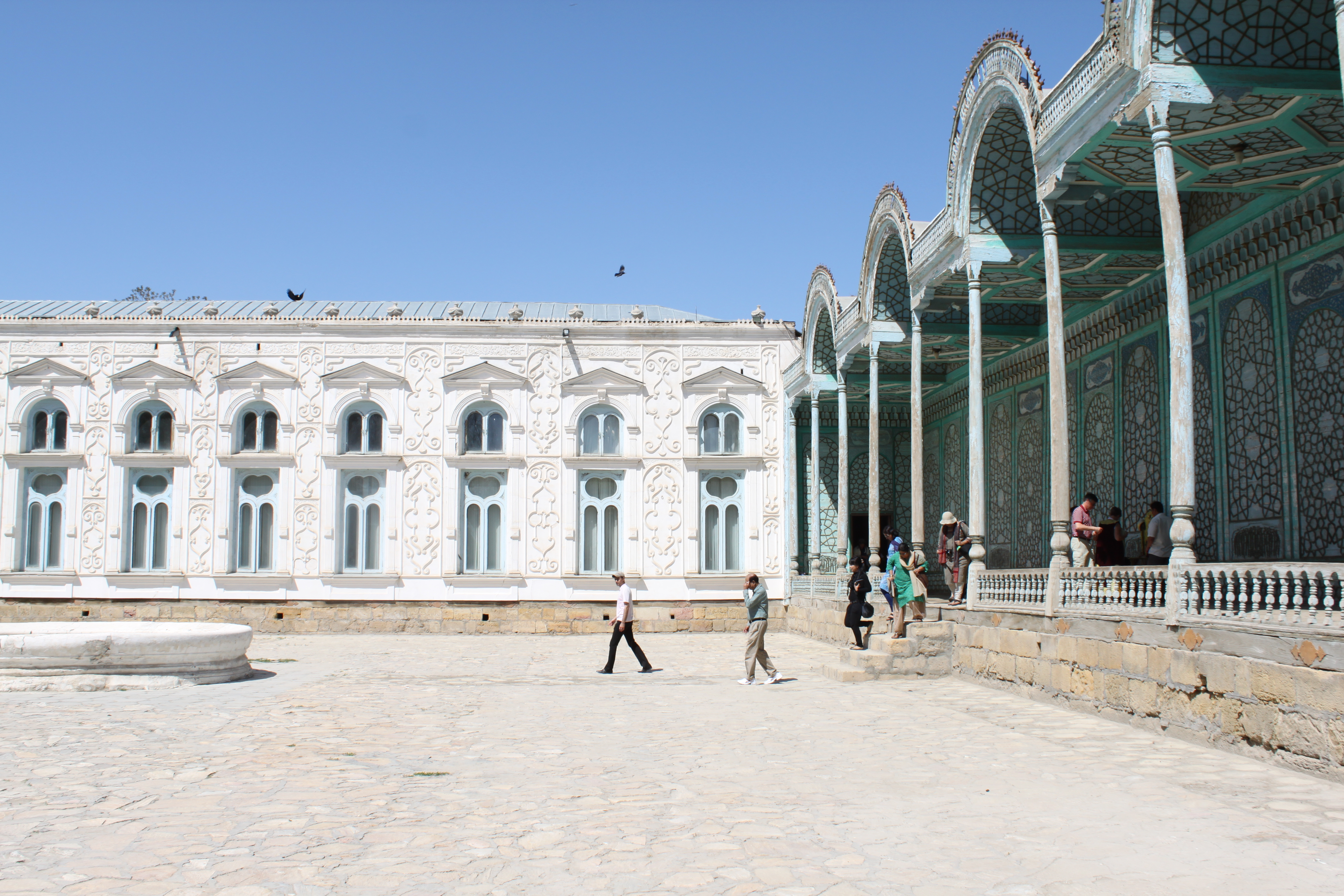 Cour intérieure principale sur 3 côtés :(appartemnts, salles de récpetion, iwan)